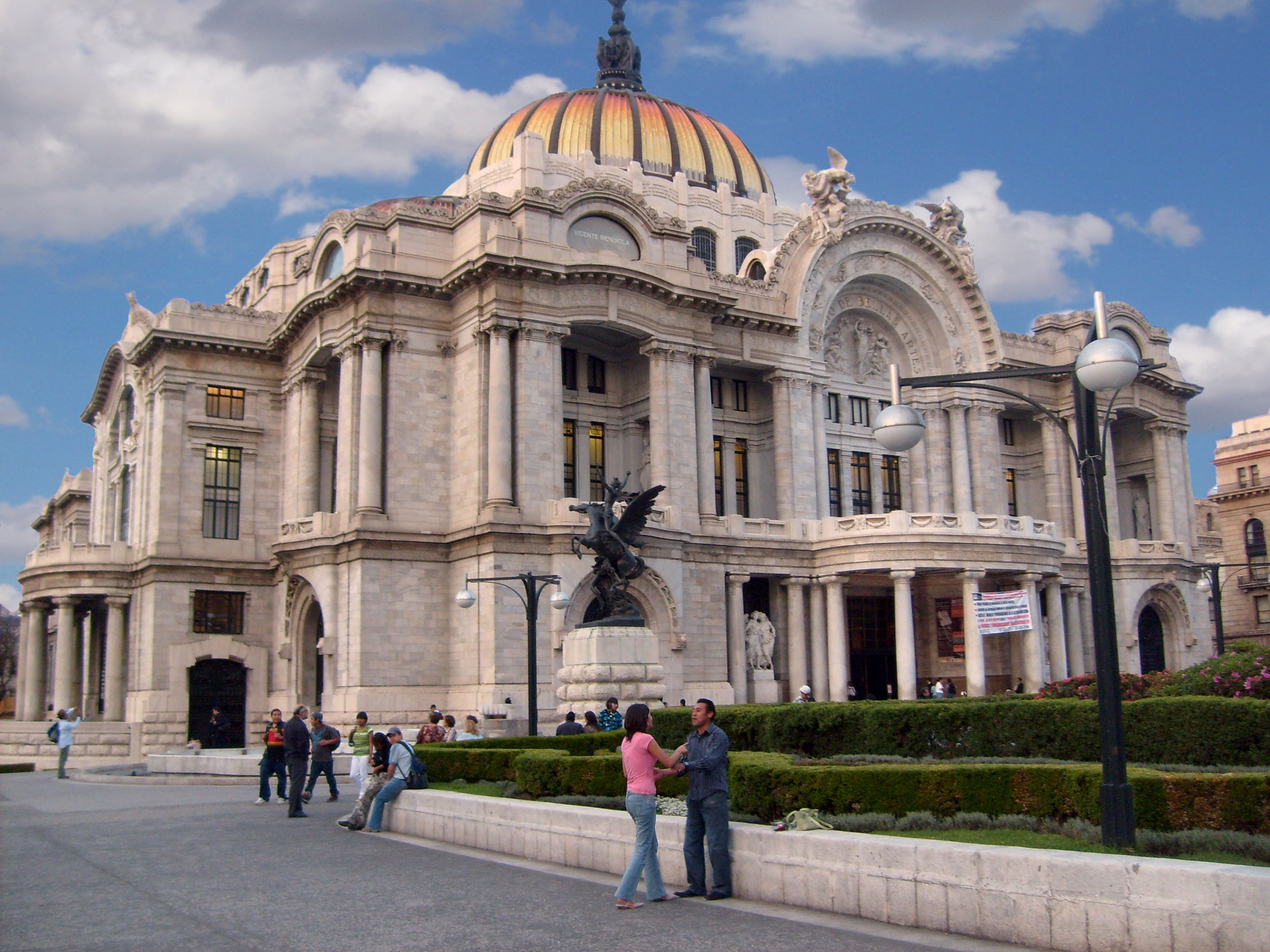 Palacio de Bellas Artes en el Centro Histórico de la Ciudad de México, en México